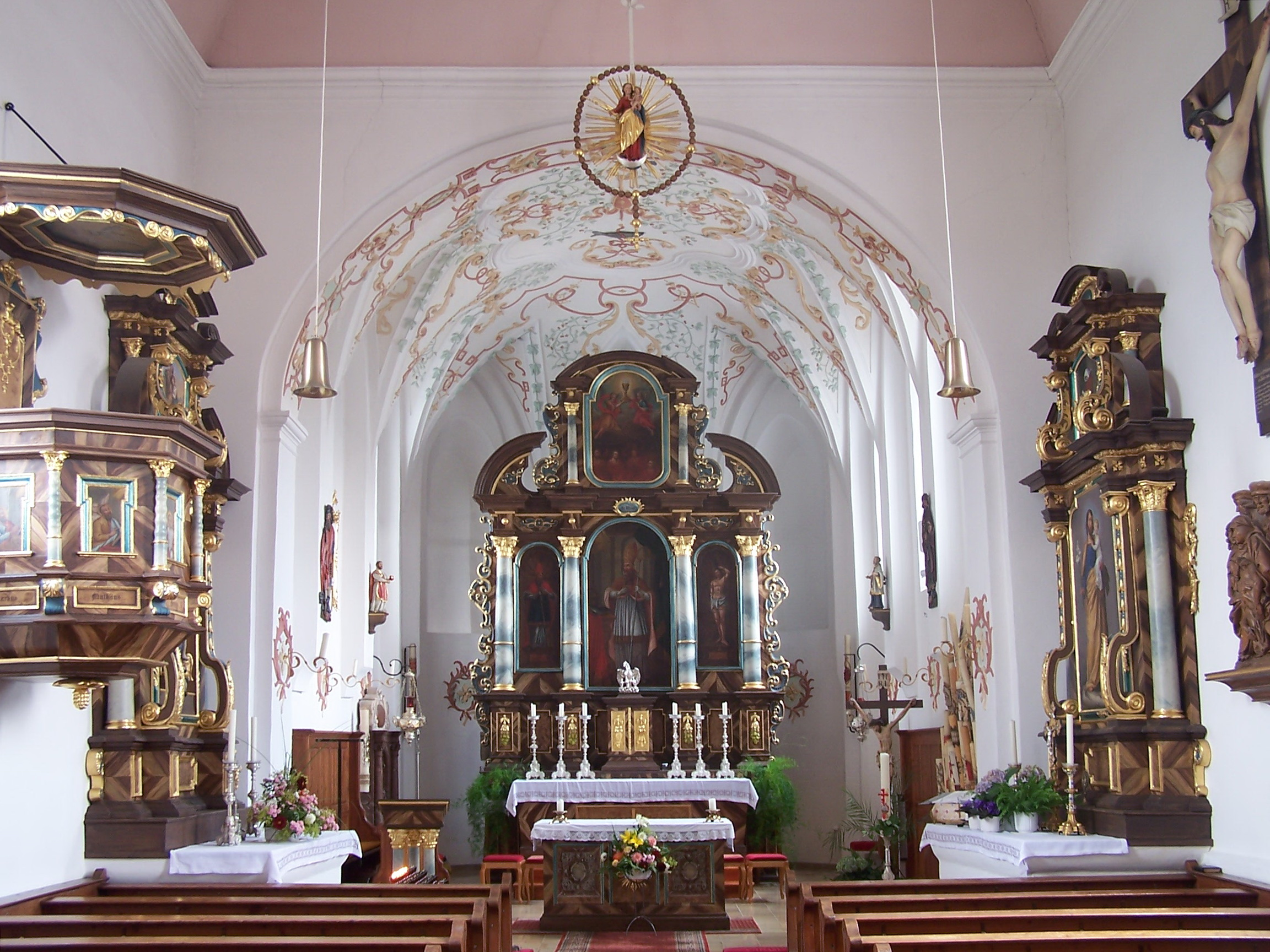 Rottenburg an der Laaber. Gisseltshausen, Kirchweg 2. Kirche St. Ulrich. Der kaum eingezogene Chor umfasst drei Joche und schließt in drei Seiten eines Achtecks. Die Seitenaltäre stehen längs der Langhauswand. Das Langhaus ist flach gedeckt.